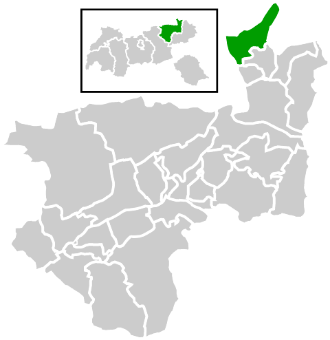 Lage der Gemeinde innerhalb des Bezirks Kufstein